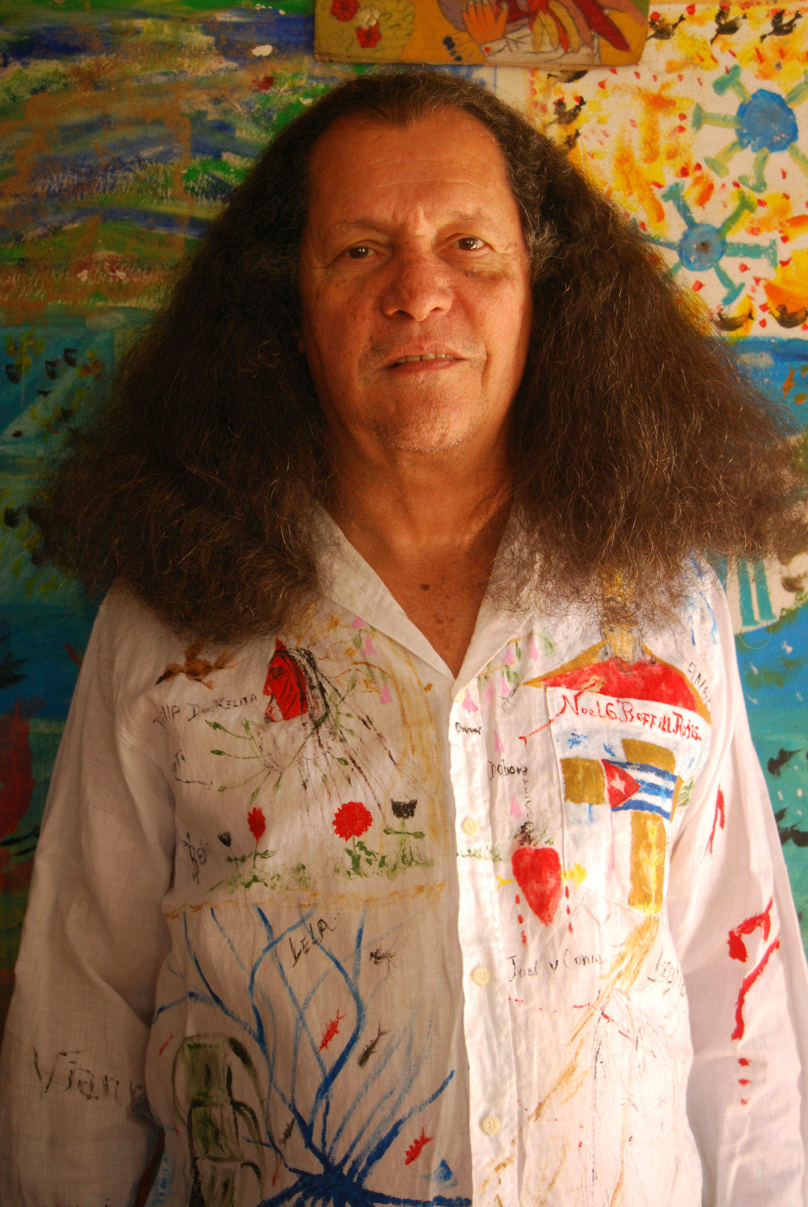 Noel Guzmán Boffil Rojas en su casa, vistiendo su obra